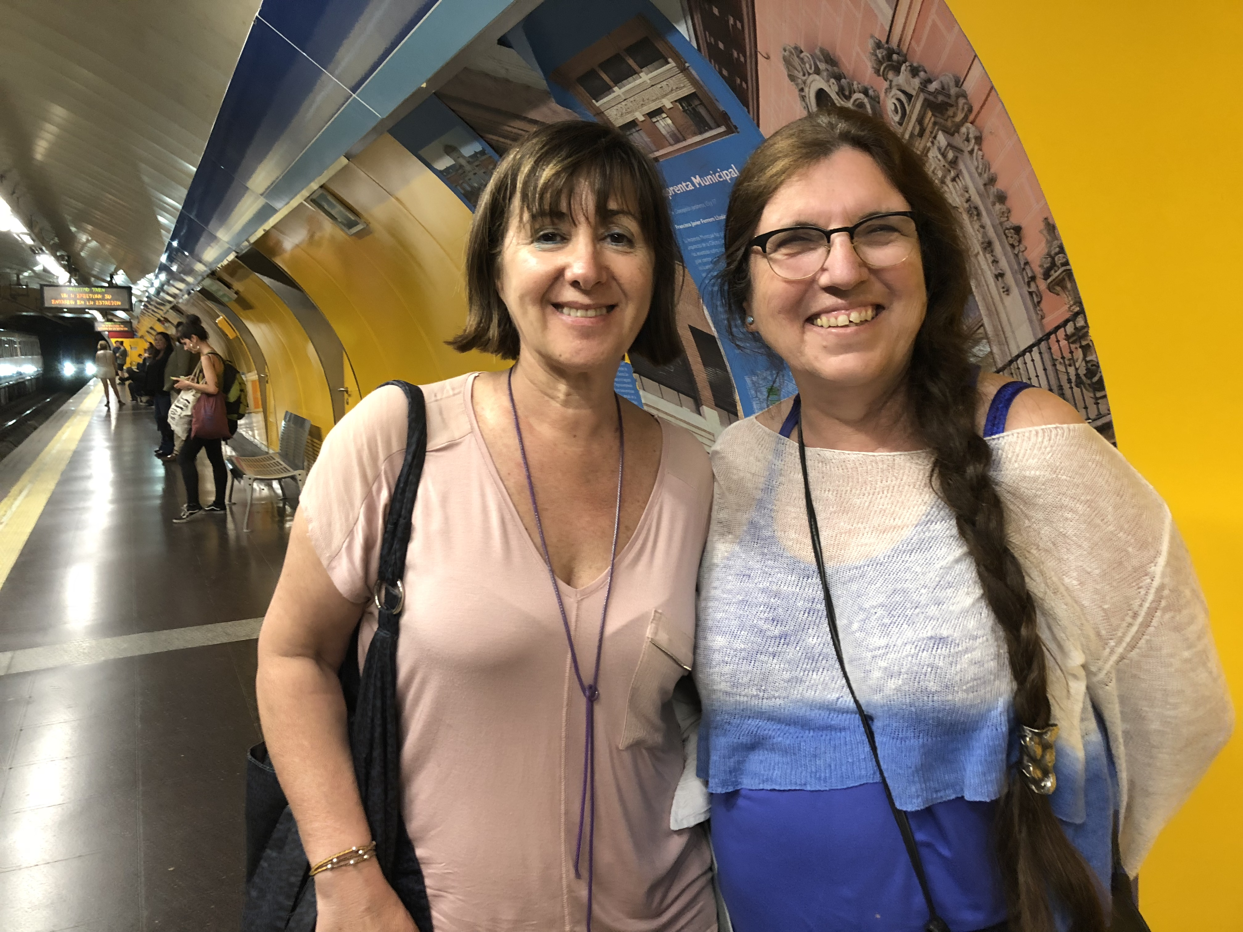 Madrid 2018